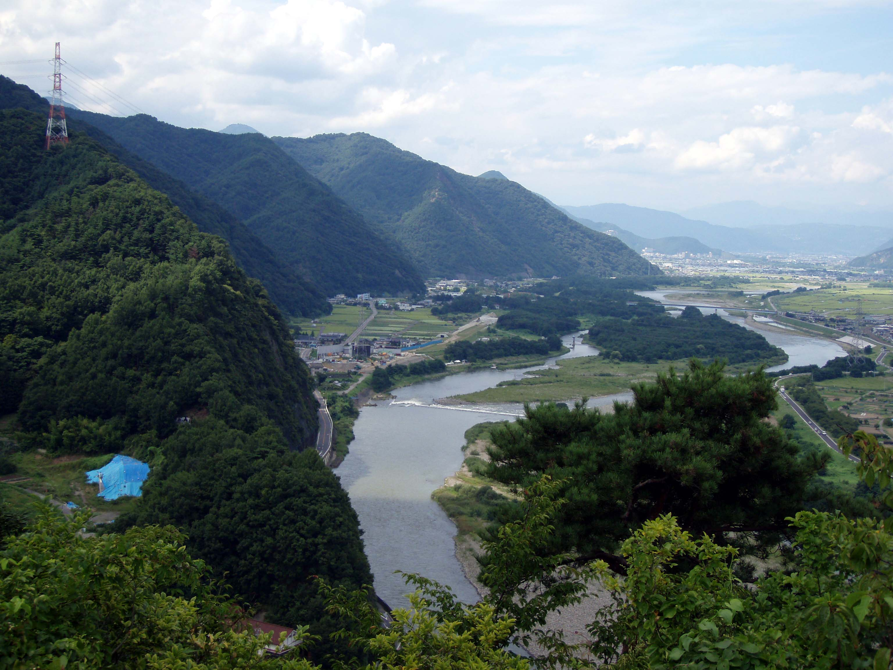 岩鼻の千曲公園から望む（半過地区）千曲川の下流方向。(左岸の山は急傾斜で川の流れとともに坂城町まで続く)